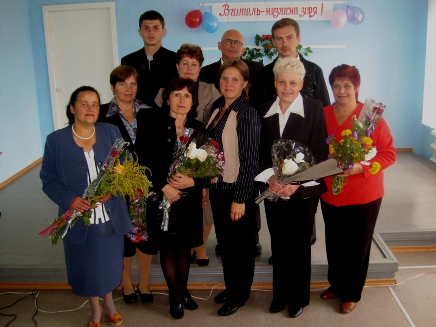 Педколектив школи.